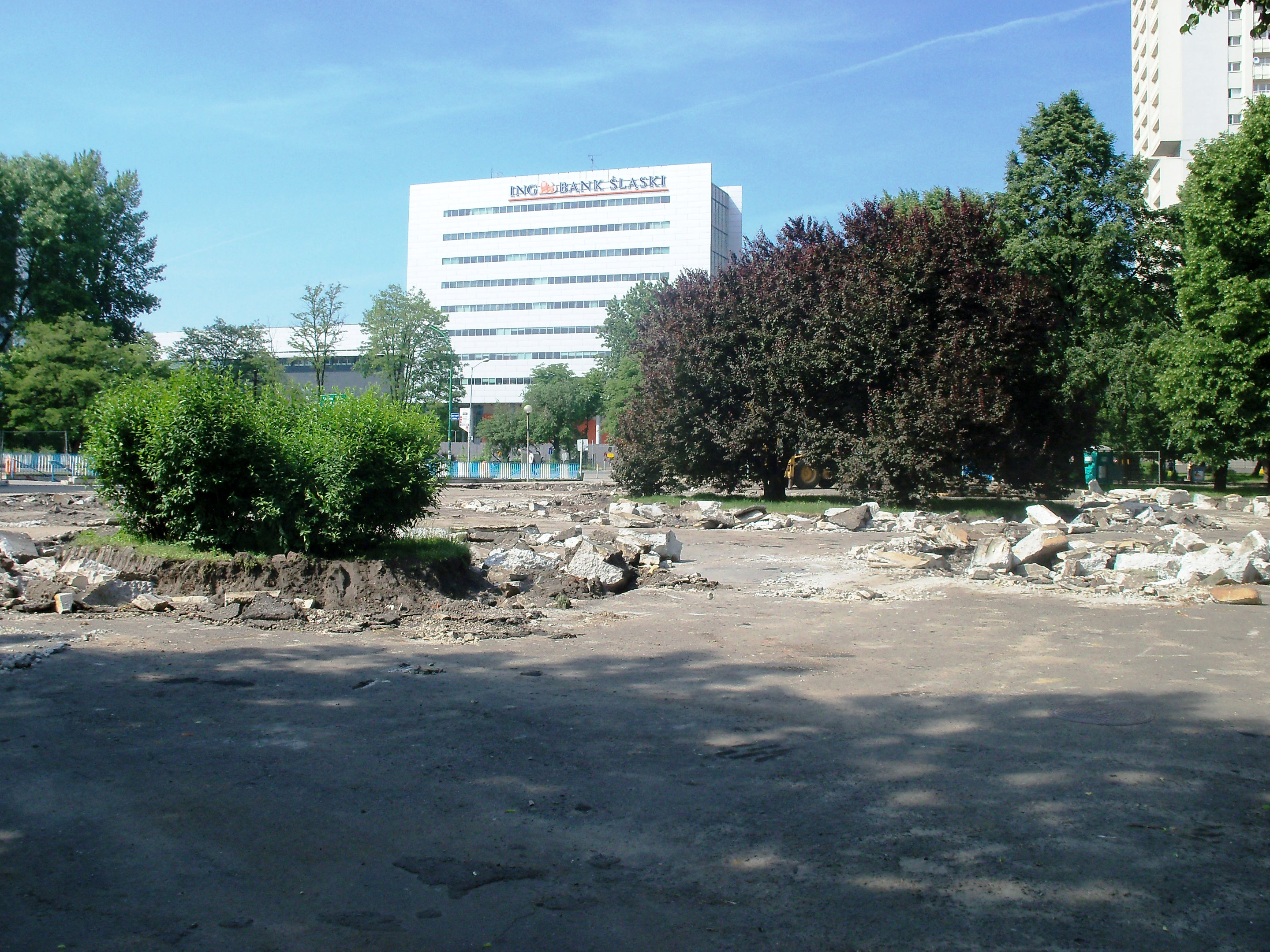 Skwer Przyjaciół z Miszkolca przy ul. Sokolskiej w Katowicach - przebudowa skweru w 2011